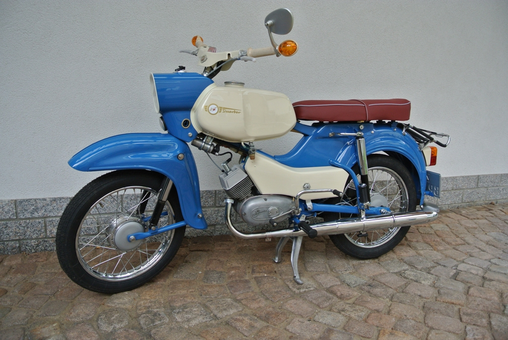 Zustand nach vollendeter Restauration